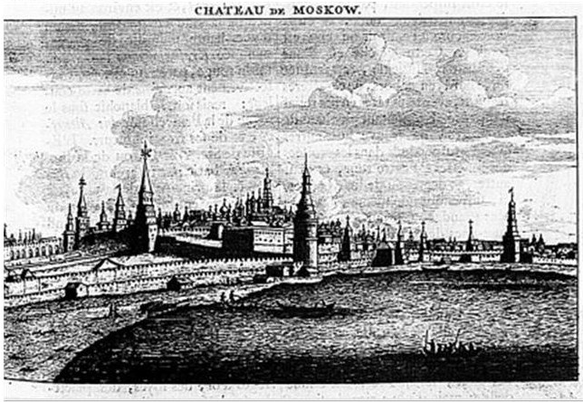 Иллюстрация из книги К. де Брюйна "Reizen over Moskovie, door Persie en Indie"